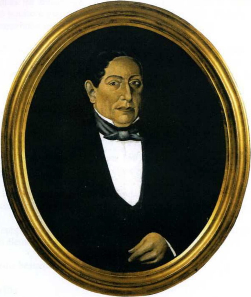 Anoniem. Portret van Thomas Regout. 19e eeuw. Maastricht, Sociaal Historisch Centrum Limburg.